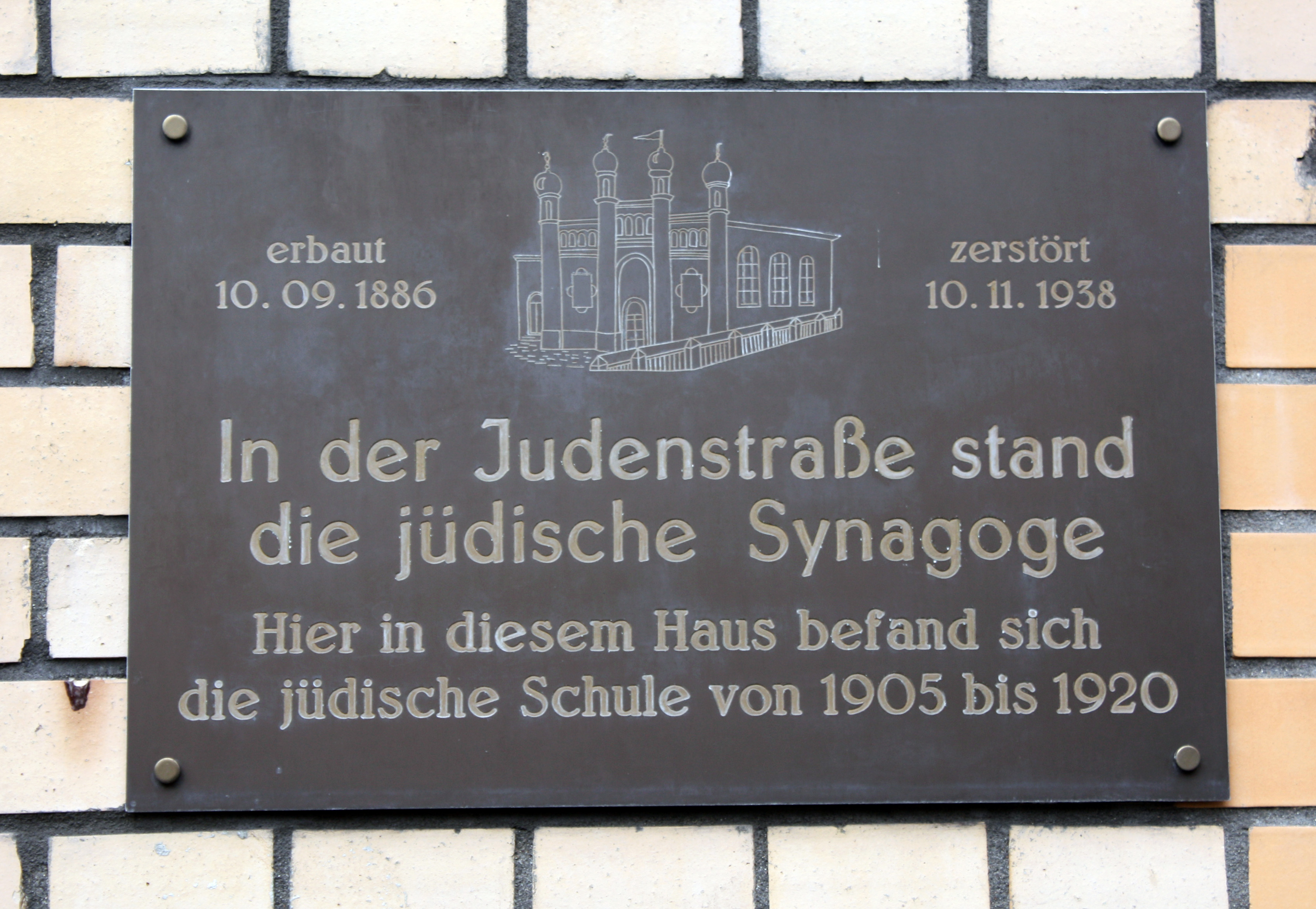 Lechenich, Infotafel an der ehemaligen jüdischen Schule in der Judenstraße